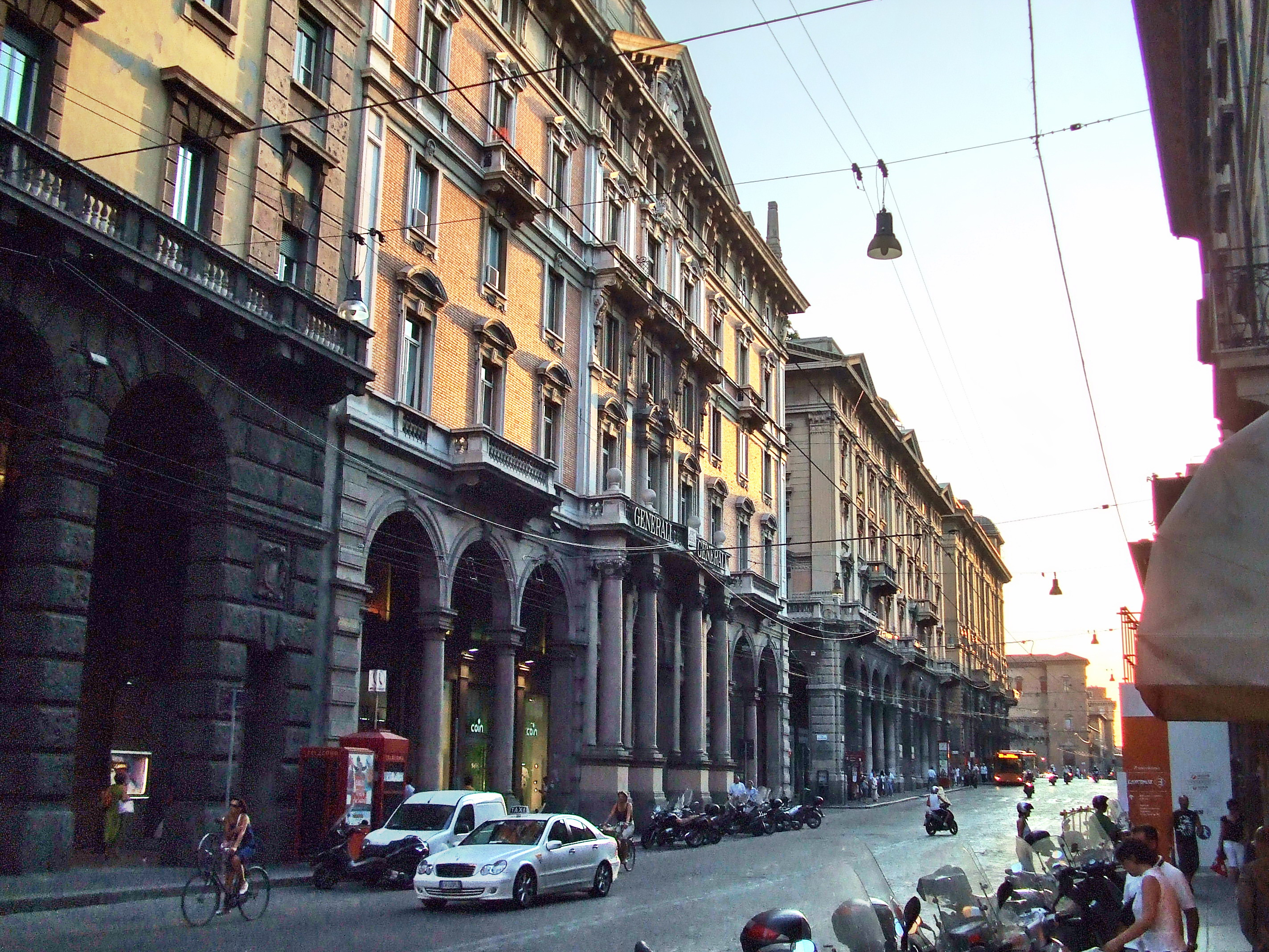 Atardecer en Via Rizzoli, Bolonia, Italia